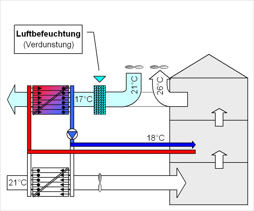 Aktive Nachkühlung mit multifunktionaler Wärmerückgewinnung (GSWT)